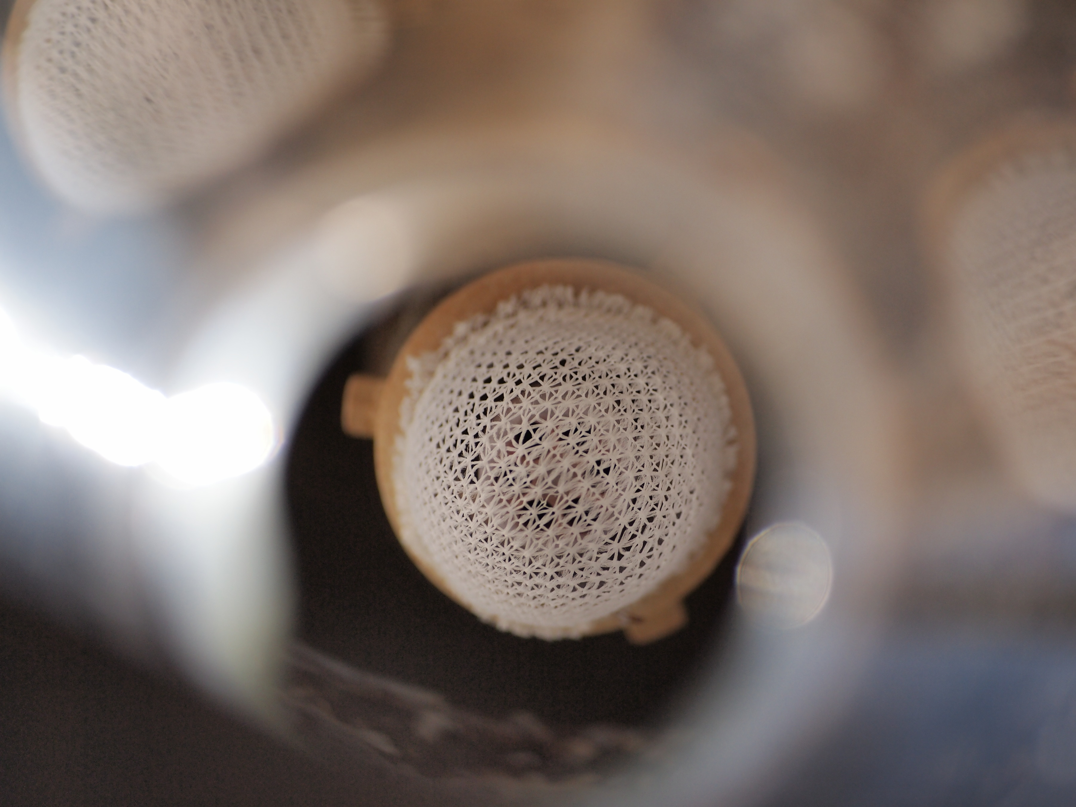 Kalter Glühstrumpf in einer Gaslaterne in Lübeck